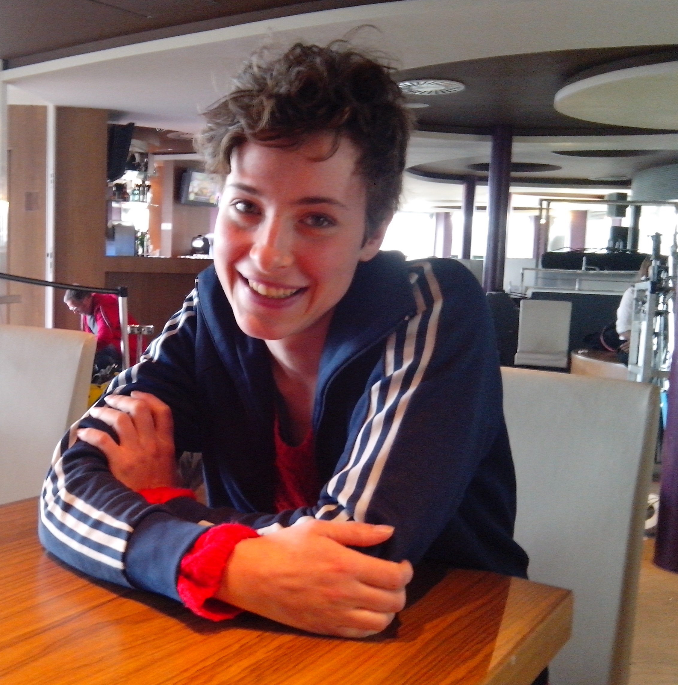 La comédienne Salomé Richard